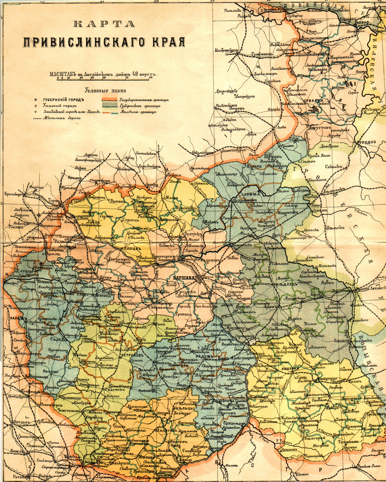 Карта Привислинского края (Царства Польского) в 1896 году